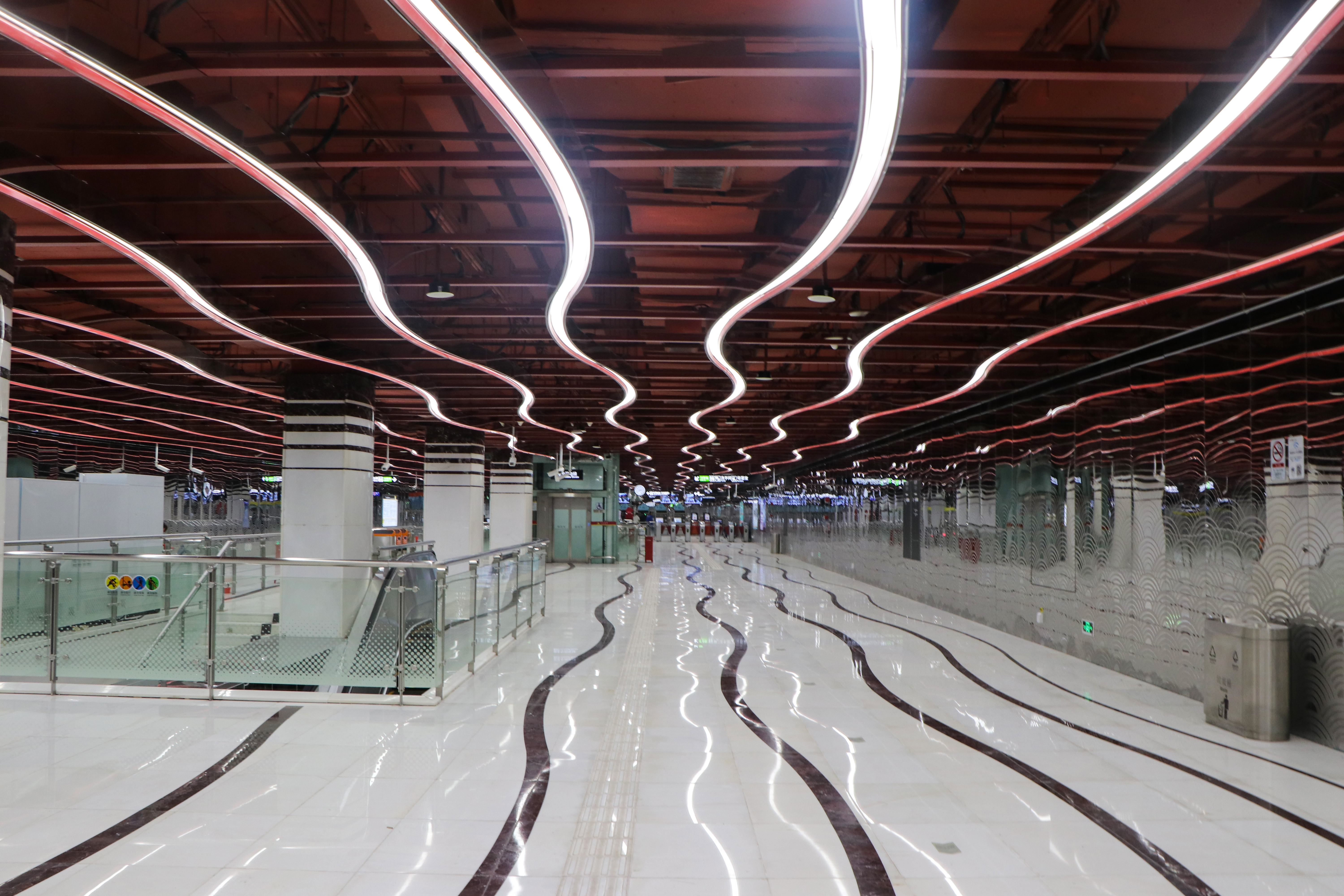 广州地铁南海神庙站